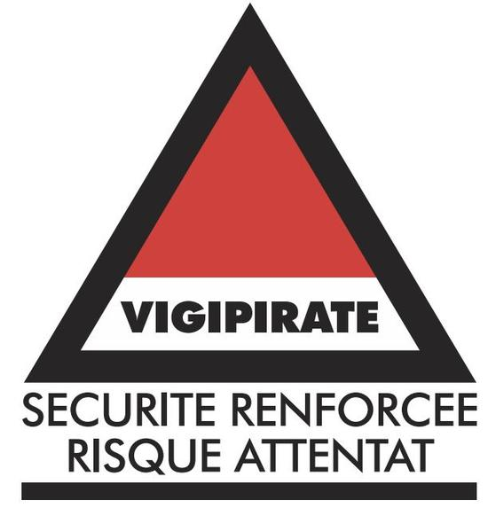 Plan Vigipirate Securité Renforcée Risque Attentat